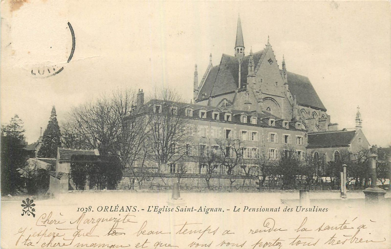 Orléans vers 1900 CPA le pensionnat des Ursulines (aujourd'hui séminaire d'Orléans), avec la collégiale Saint-Aignan au fond.